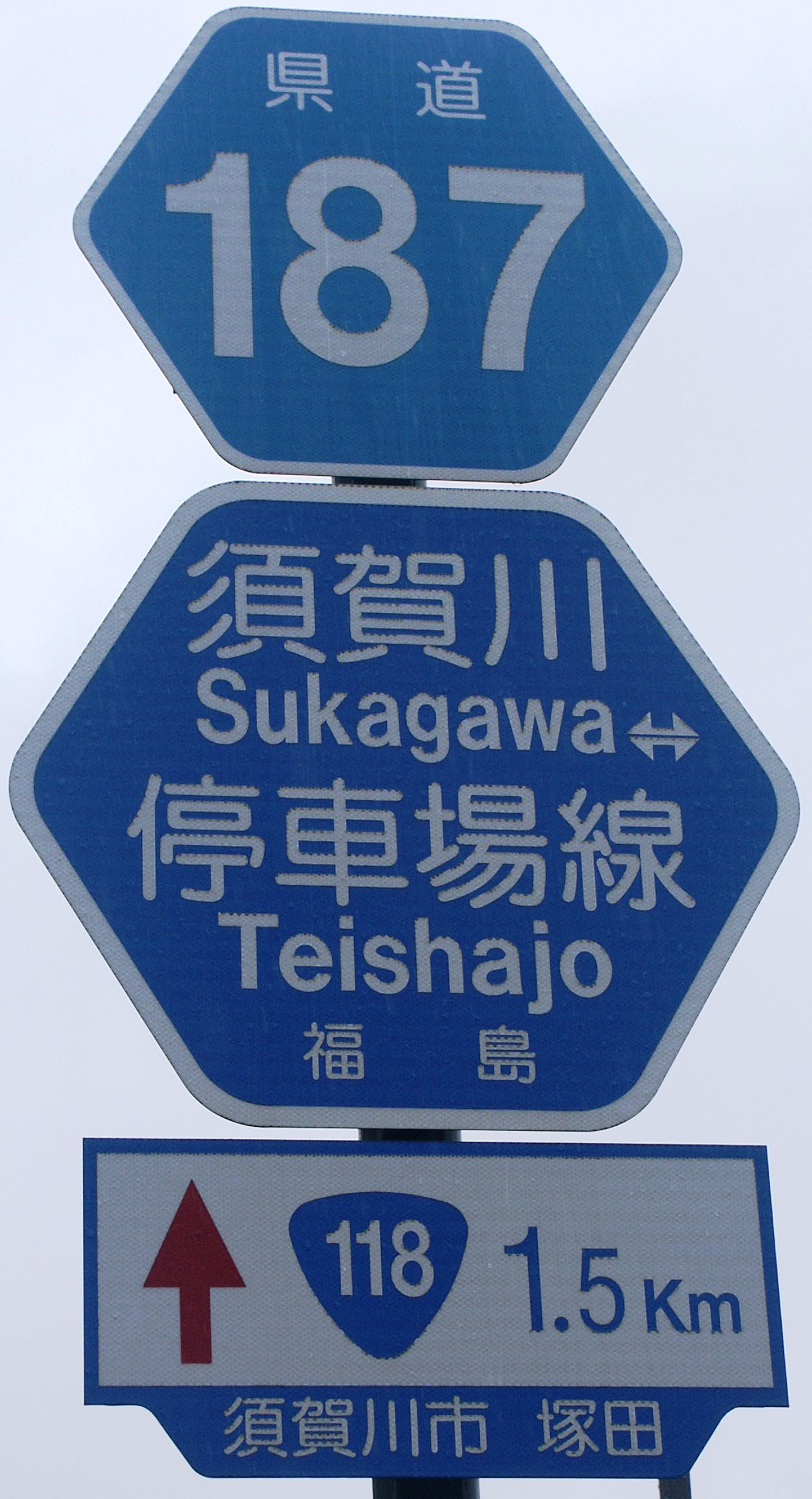 福島県道187号線の路線番号標識